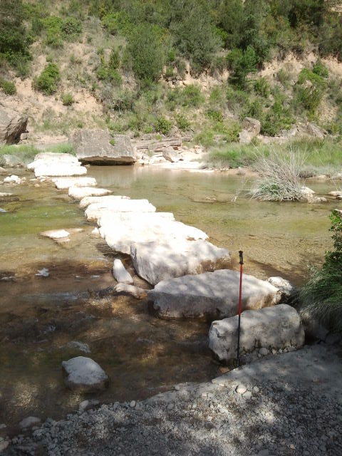 Losas para cruzar el río aguas abajo de la fuente de Tamara cerca de la localidad de Morrano.